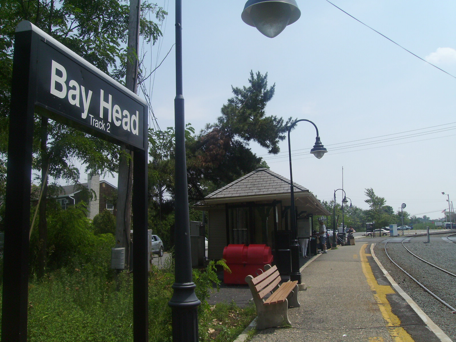 Vivitar